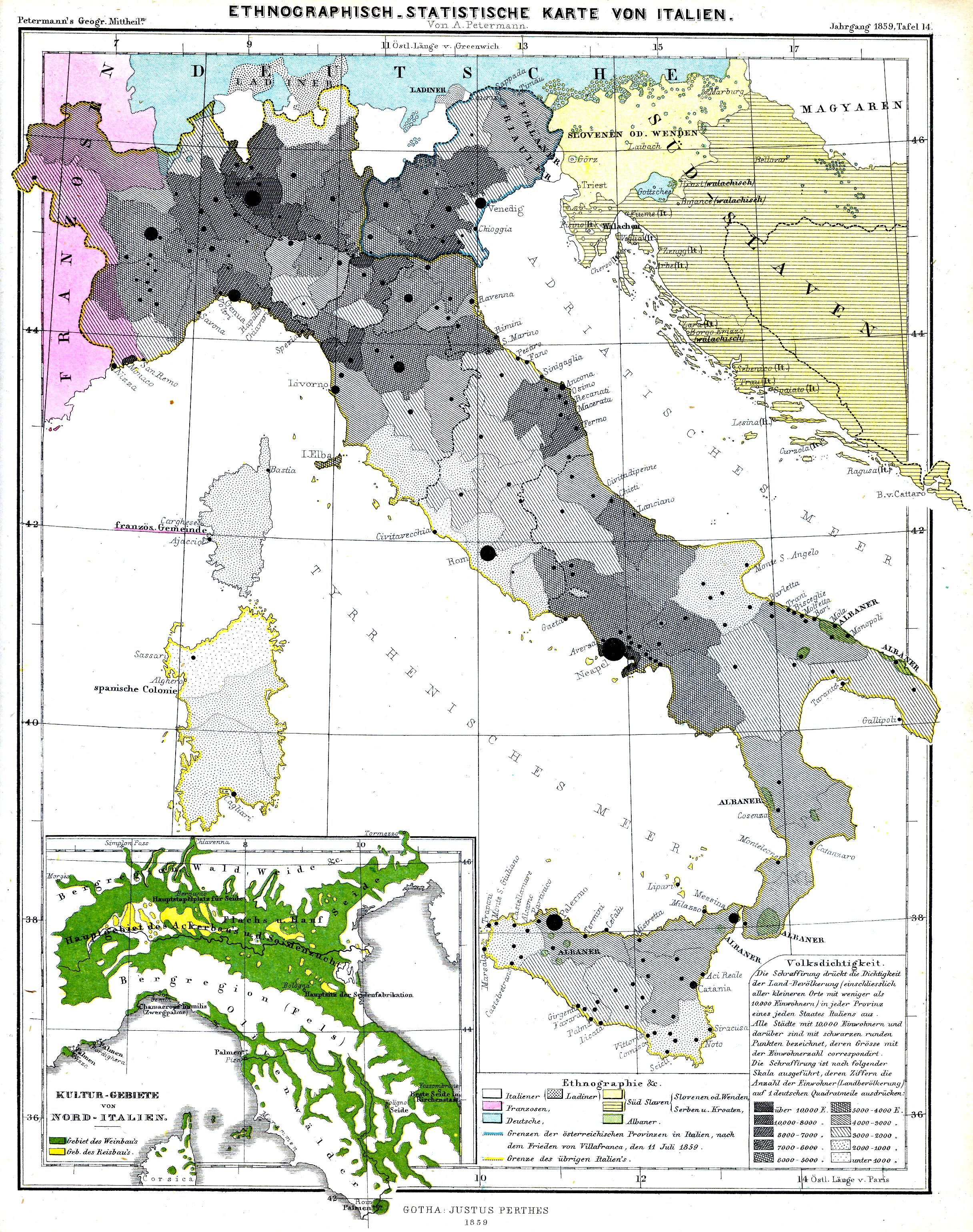 Ethnographisch-statistische Karte von Italien